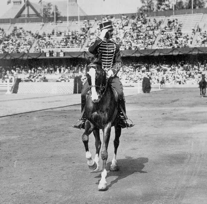 Carl Bonde (1872-1957)